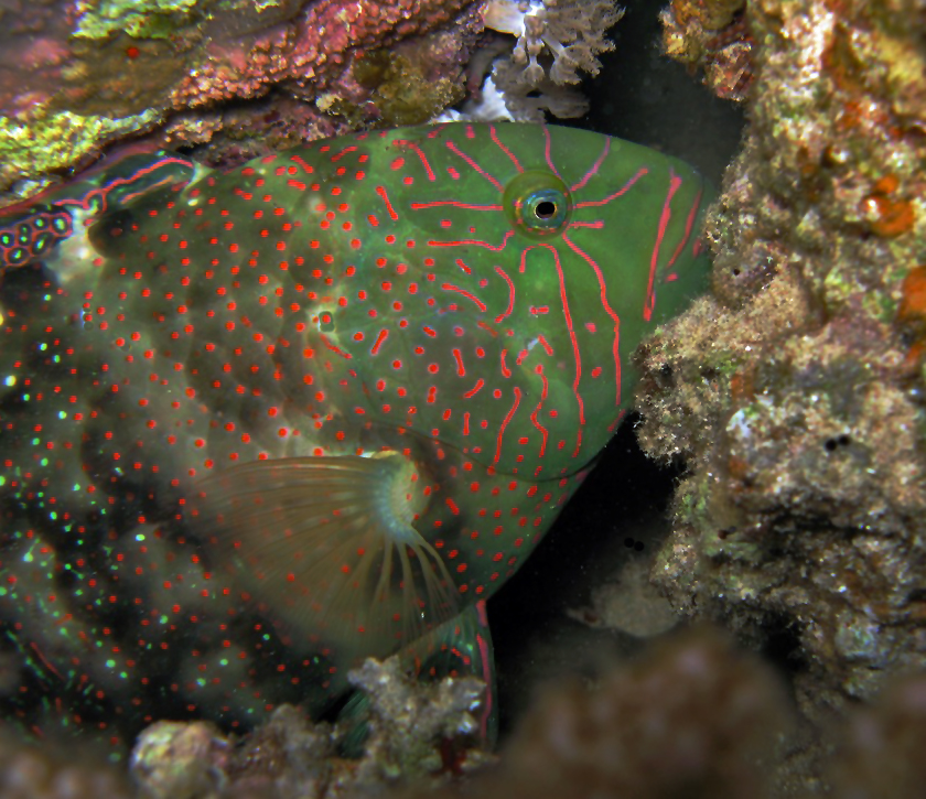 Viridescent Parrotfish - Calotomus viridescens; Egypt-Sinai-Dahab